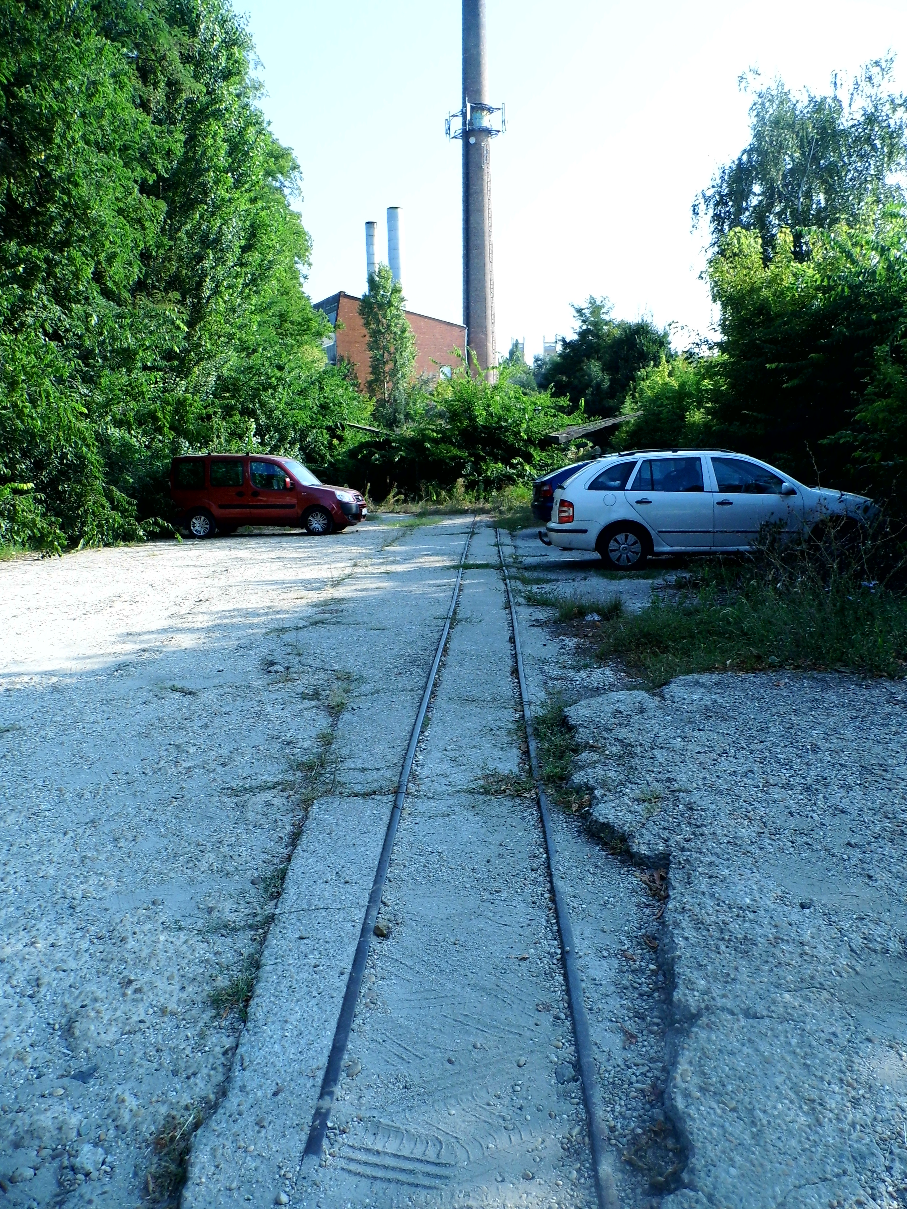 Úttörővasút maradványa a fóti Károlyi-kastély kertjében